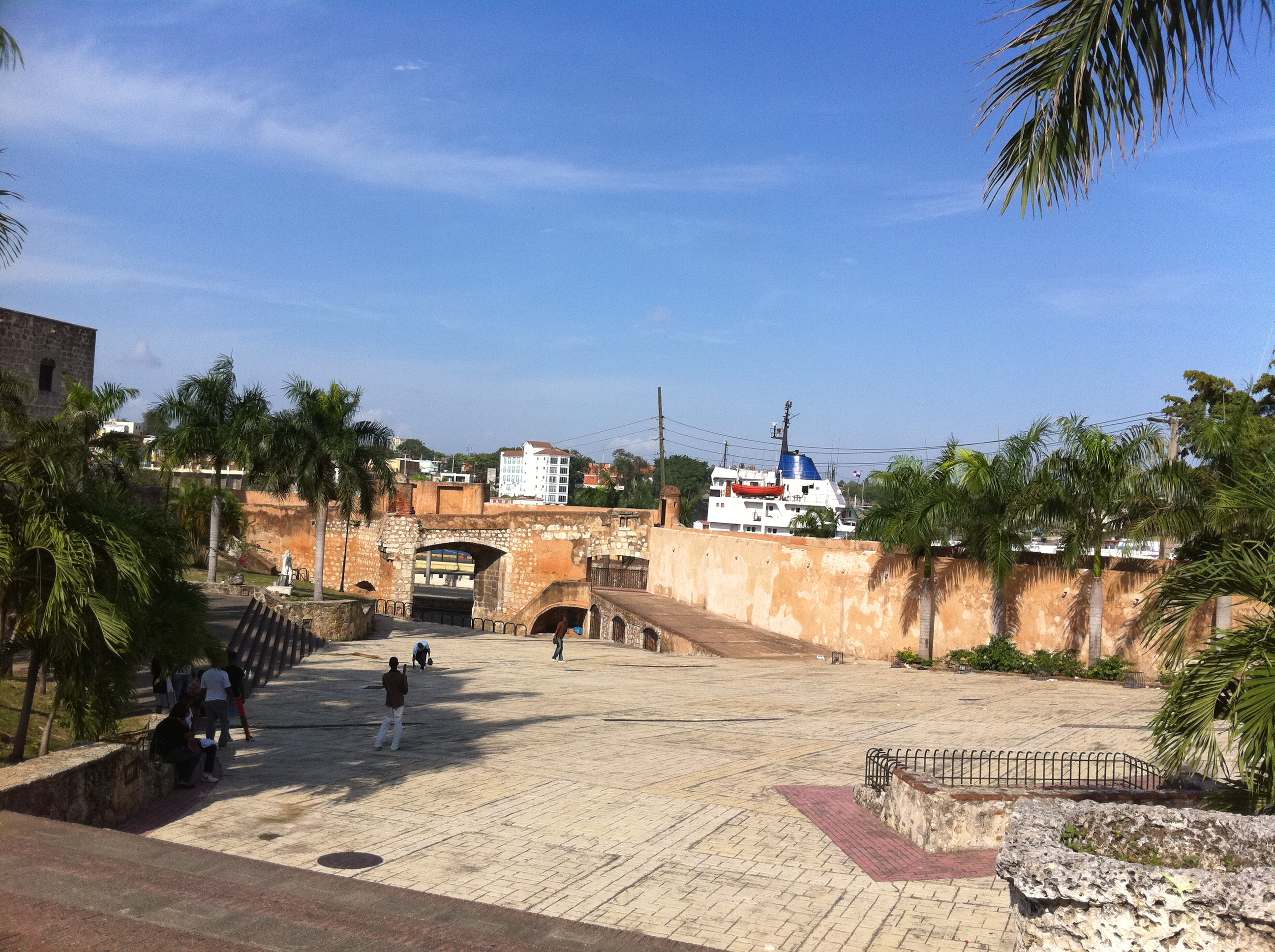 Plaza Espana سانتو دومينغو الدومنيكان